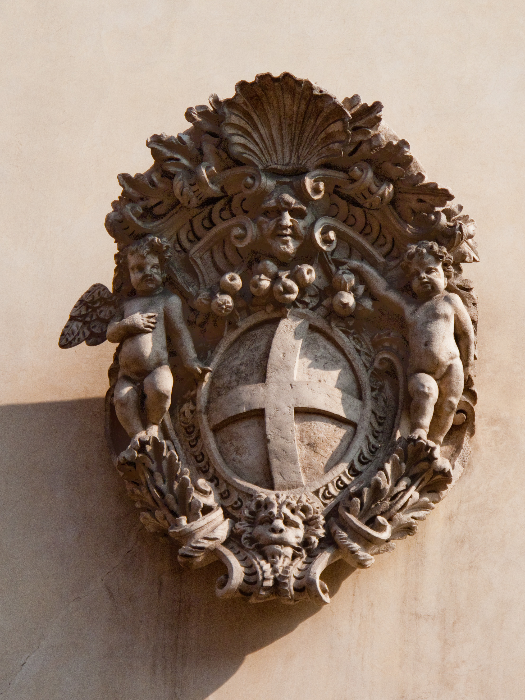 Vicenza - Chiesa di San Giuliano - Facciata: dettaglio con stemma.